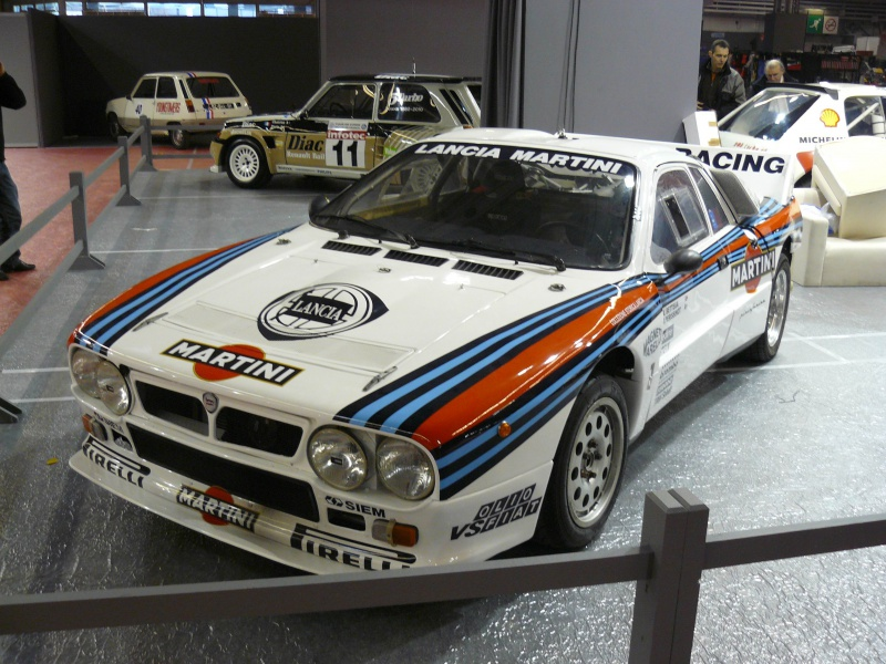 Retromobile 2012